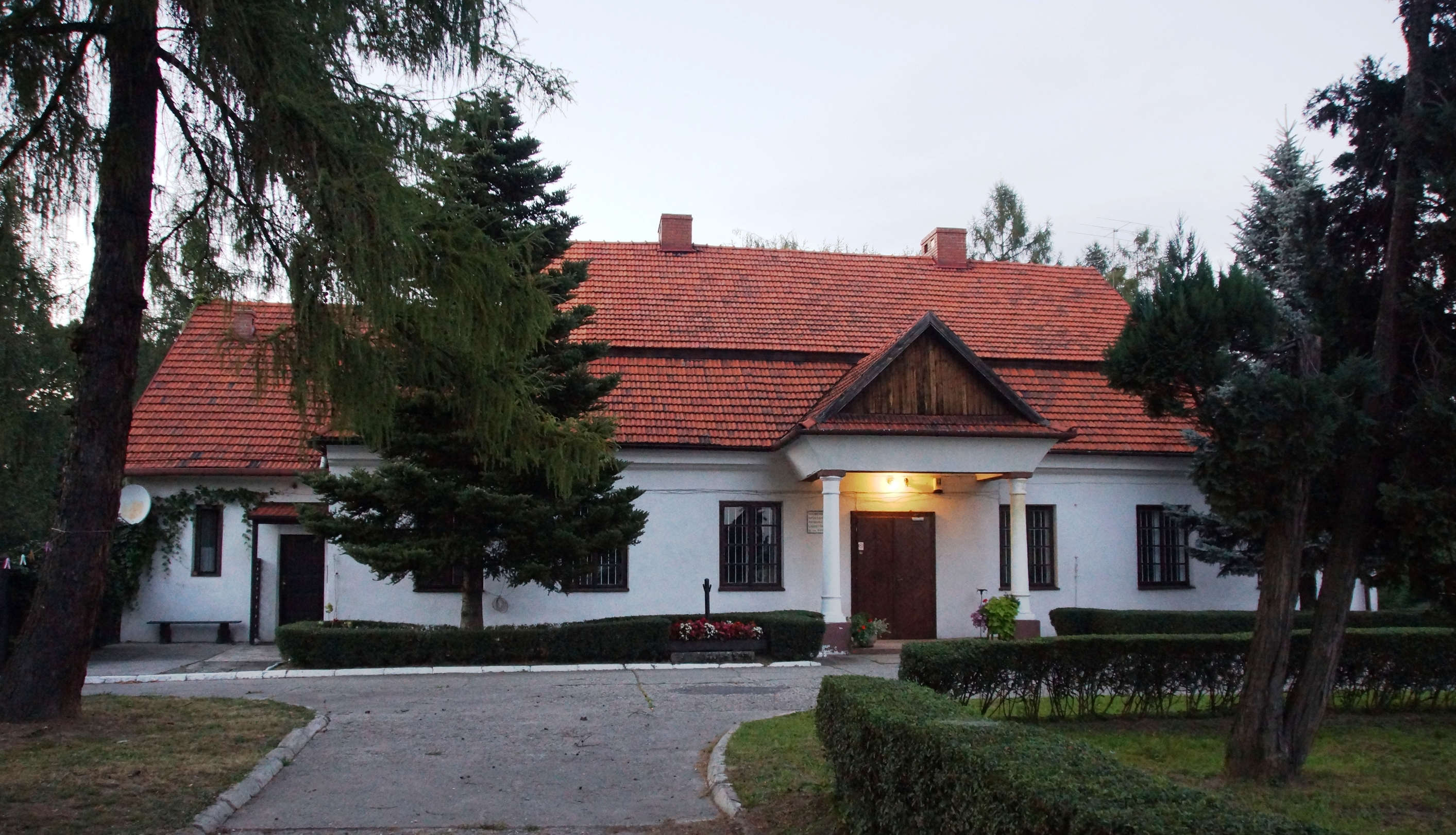 Libertów - dwór